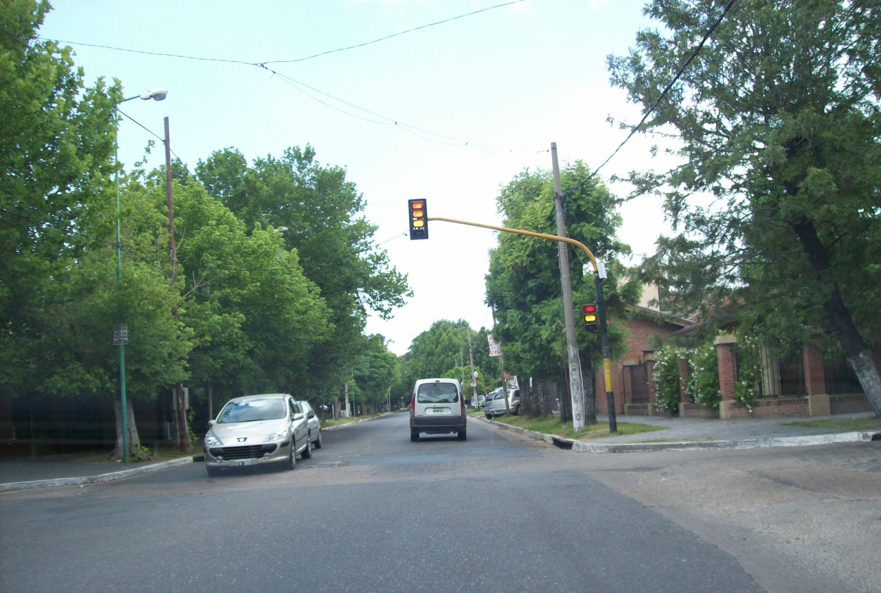 Zona residencial de Banfield, en el sur del Gran Buenos Aires.